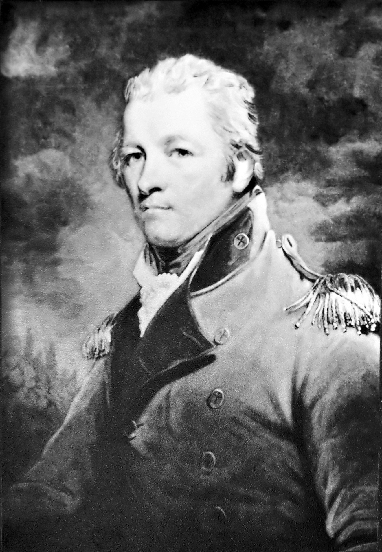 Saint-Paul-de-l'Île-aux-Noix (Québec) - Portrait de Charles Lennox, Duc de Richmond et Lennox, au Fort Lennox